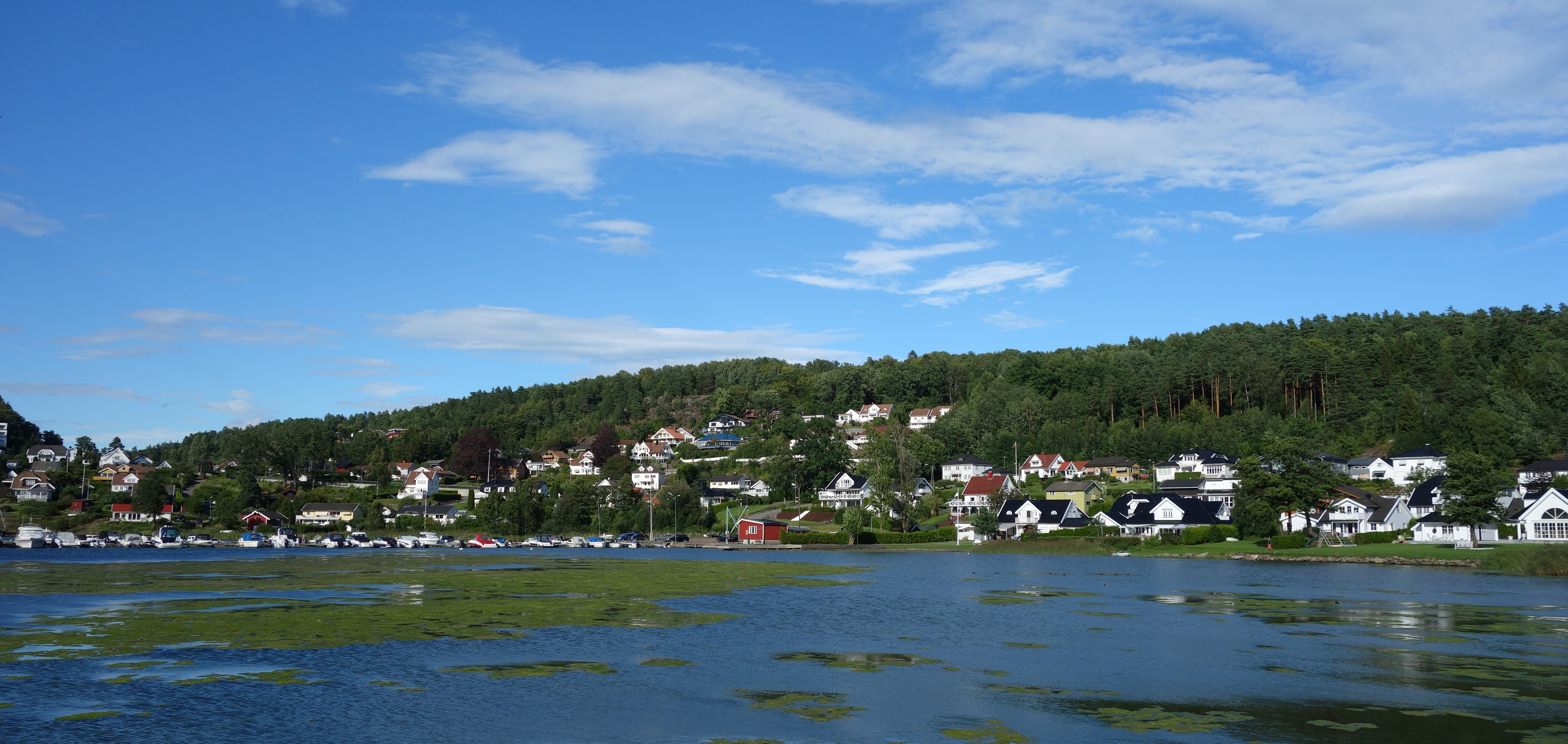 Munkerekka på Nøtterøy sett fra Munkholmen